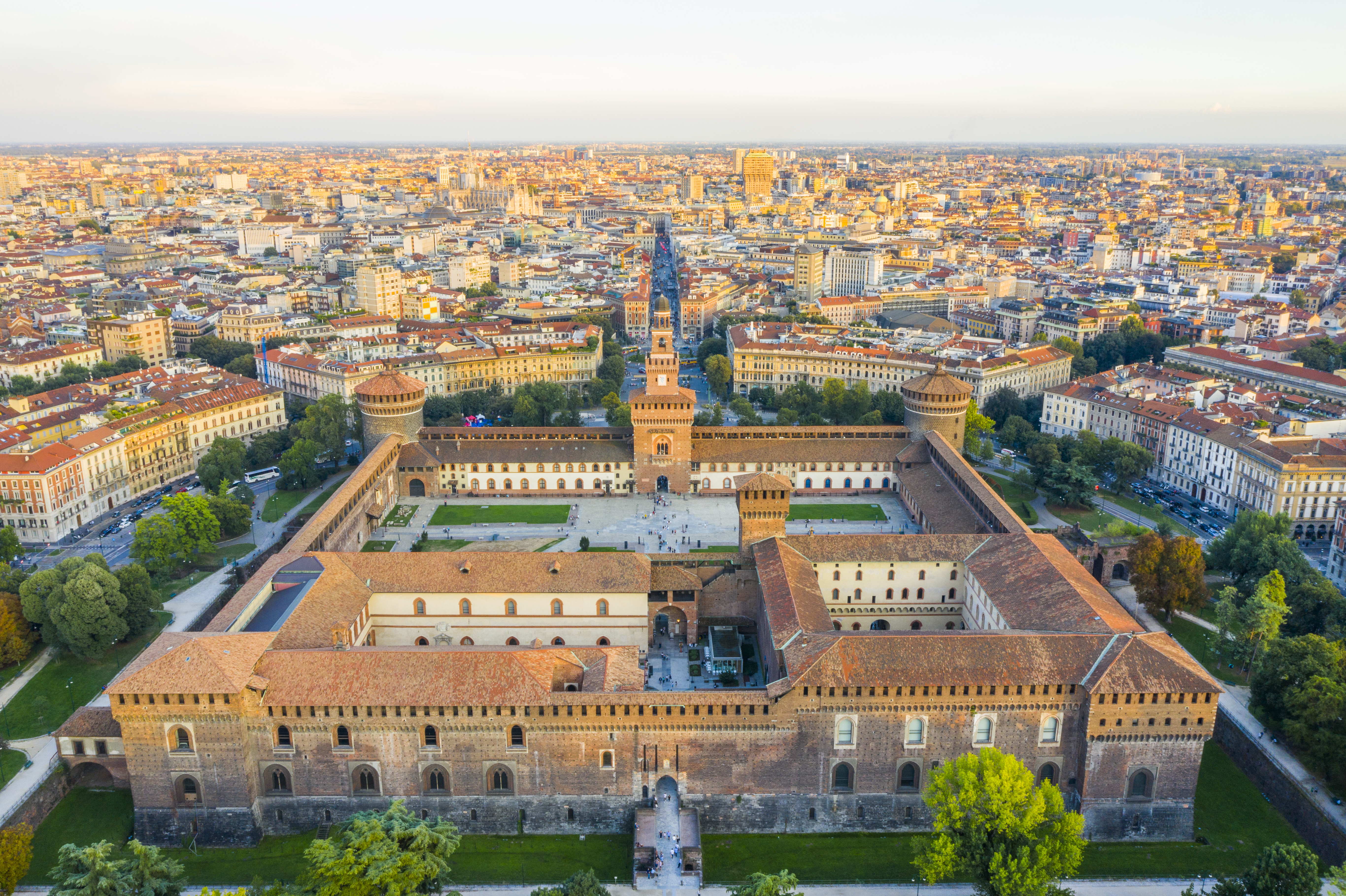 Castello Sforzesco This is a photo of a monument which is part of cultural heritage of Italy.